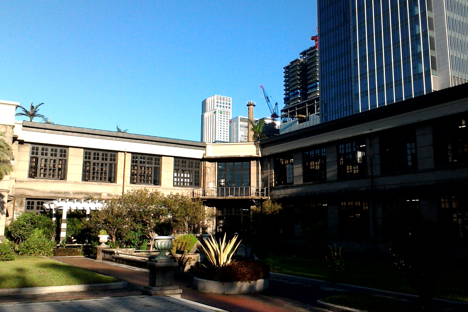 松山菸廠製菸工廠中庭,台北市信義區三張犁次分區新仁里